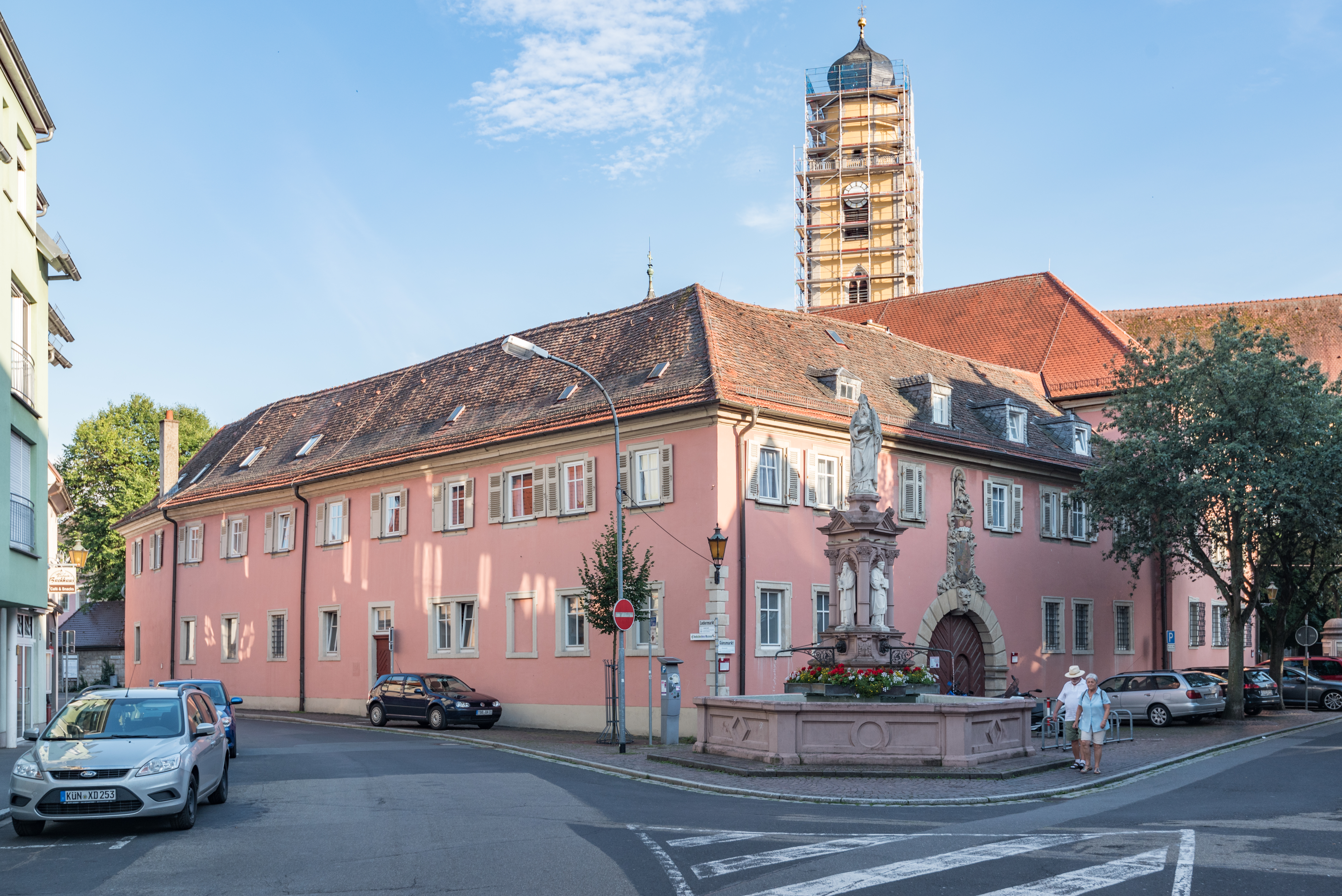 Bad Mergentheim, Kirchstraße 4